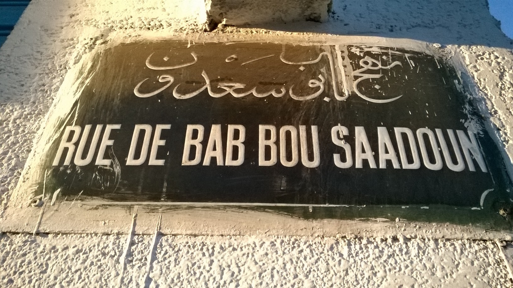 Rue Bab Bou Saadoun , Bab Souika نهج باب بوسعدون ، باب سويقة